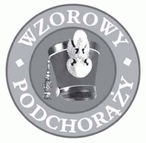 Odznaka tytułu honorowego "Wzorowy Podchorąży" – wzór 2010 – Polska.